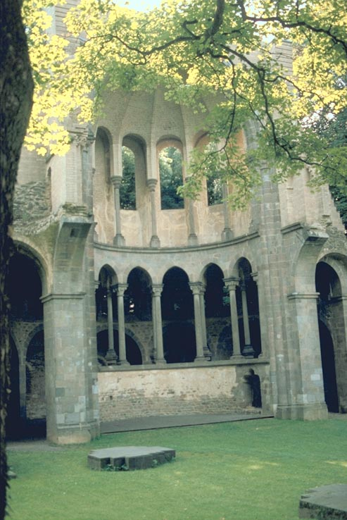 Chorruine Heisterbach